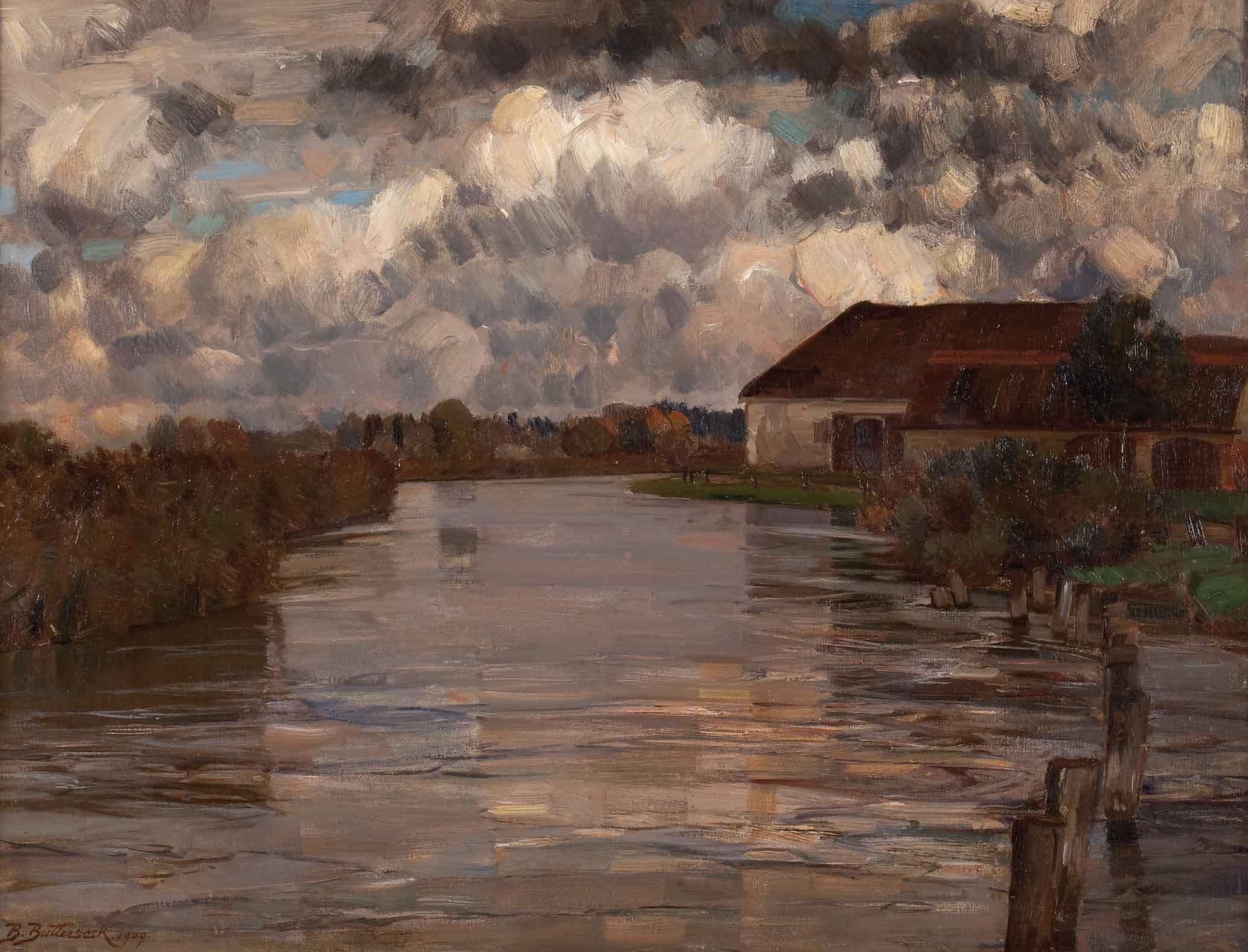 "Herbst an der Amper" unten links signiert und datiert: B. Buttersack 1909, Öl auf Leinwand, ca. 63 x 80 cm